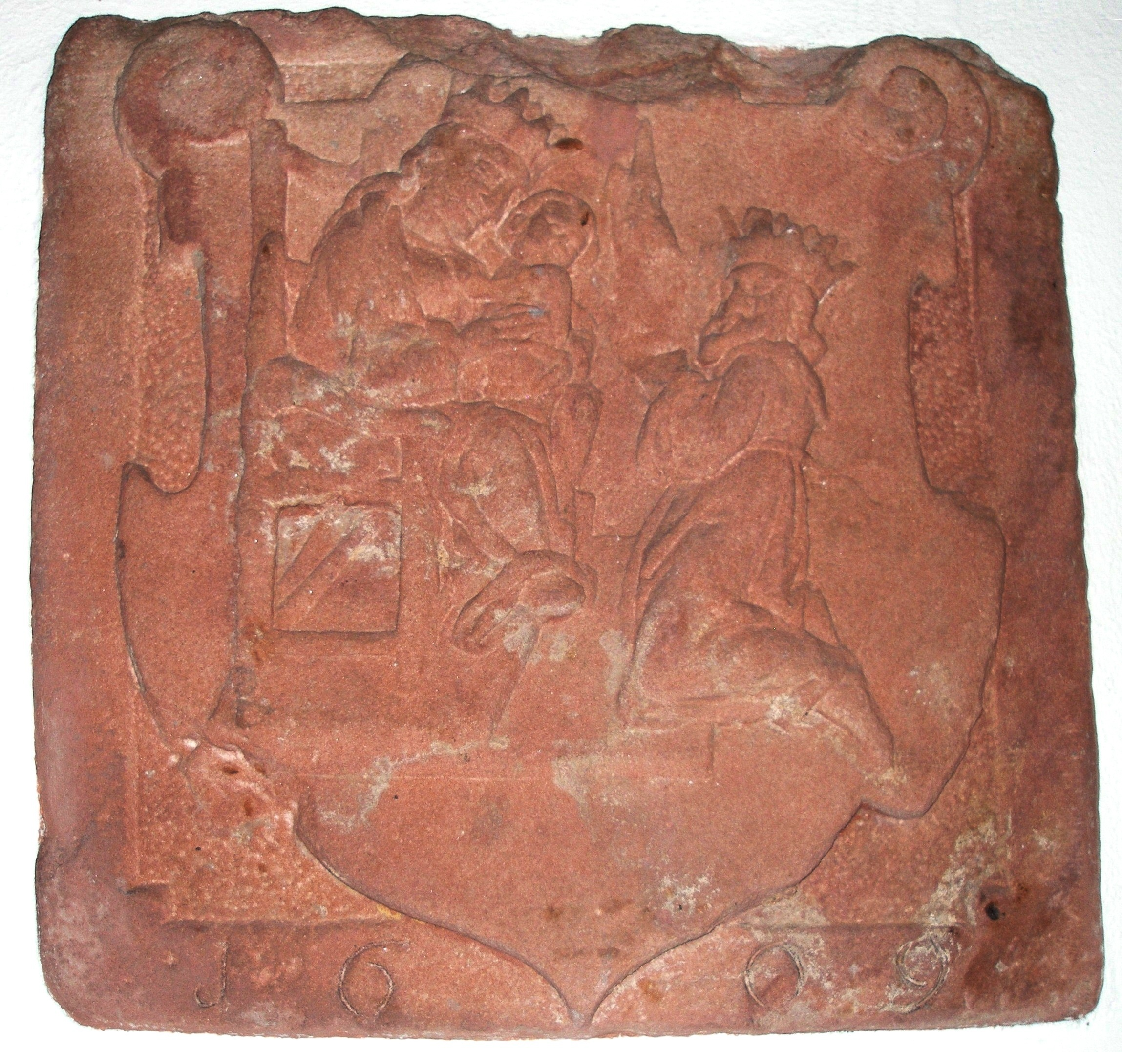 Wappenrelief (1609) im Kloster Schuttern, Stifterbild: kniend vor Maria mit dem Kind der Klostergründer Offo (als englischer Königssohn mit Krone) oder Kaiser Heinrich II. als Stifter ([1])